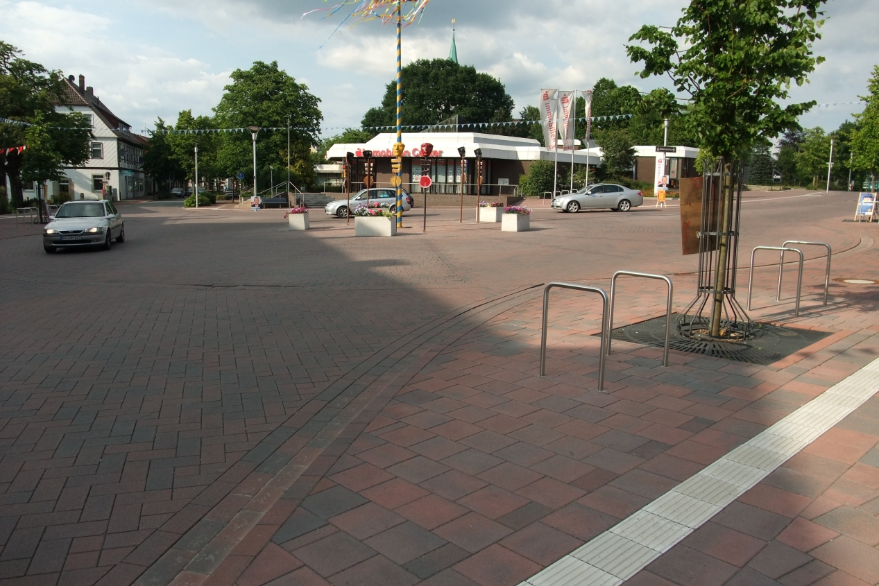 Shared-Space-Kreisel in Bohmte (Niedersachsen)